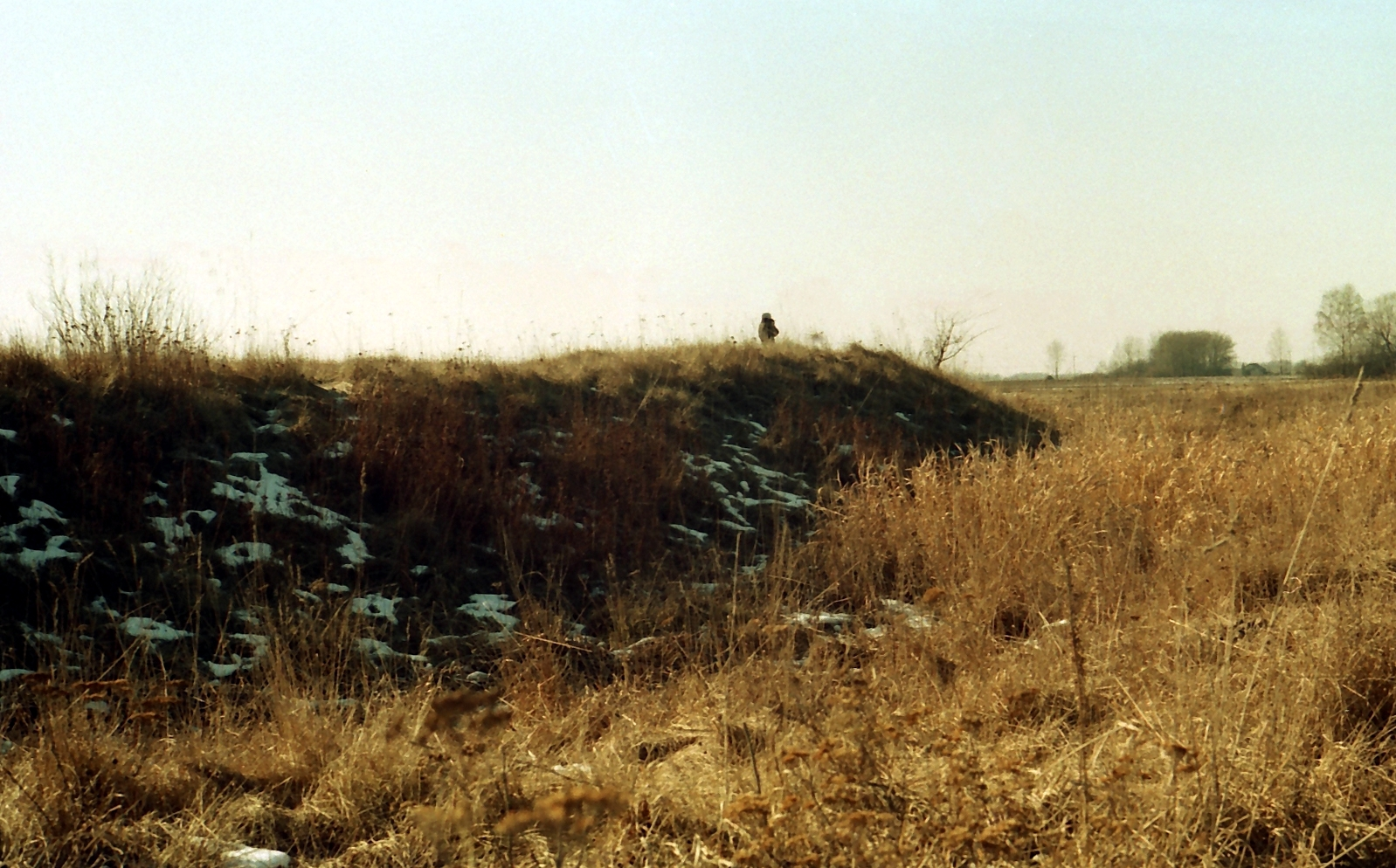 Zewnętrzne wały grodziska w roku 1993 (przed zniszczeniem).